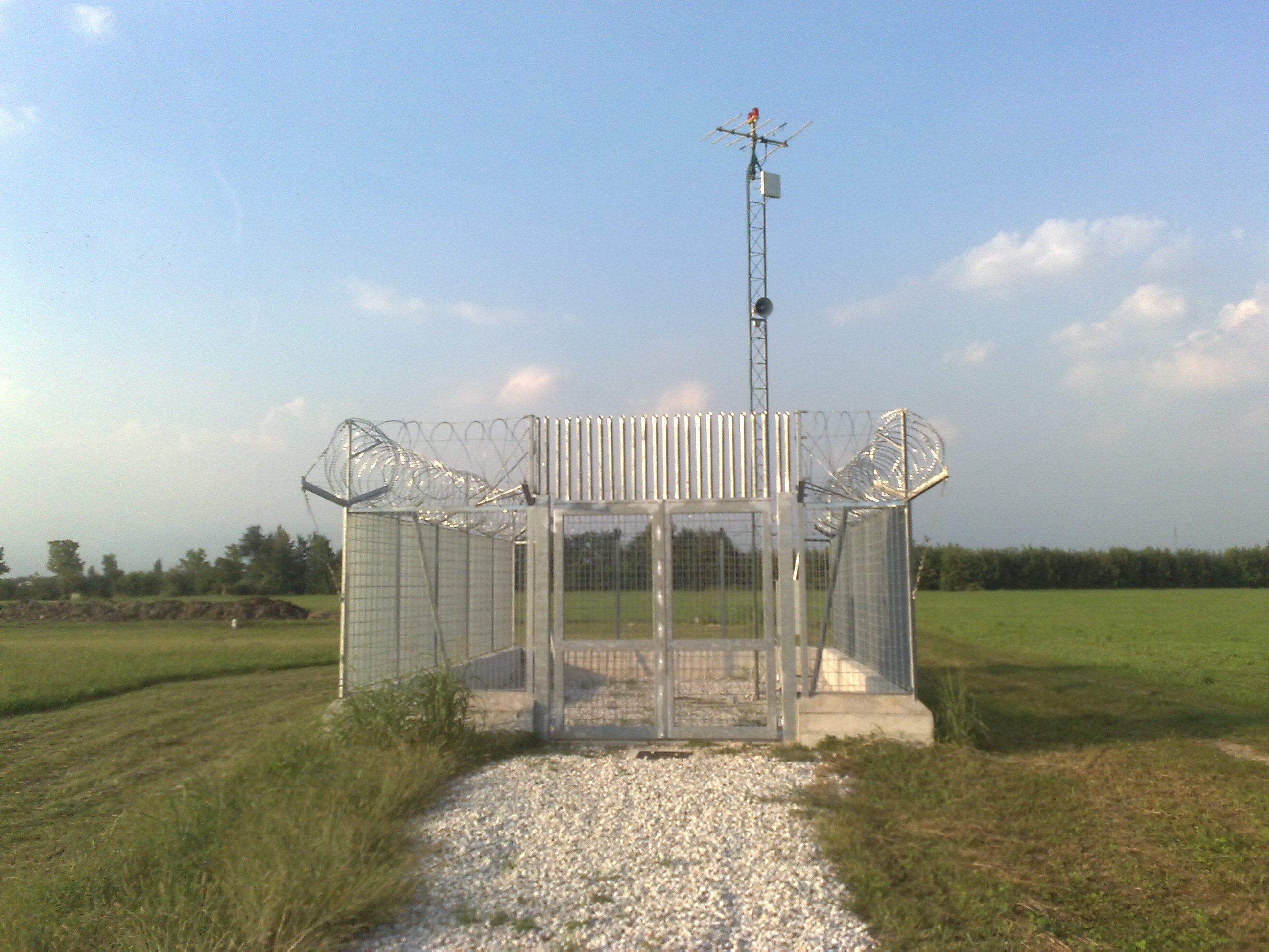 Antenna DME Vicenza